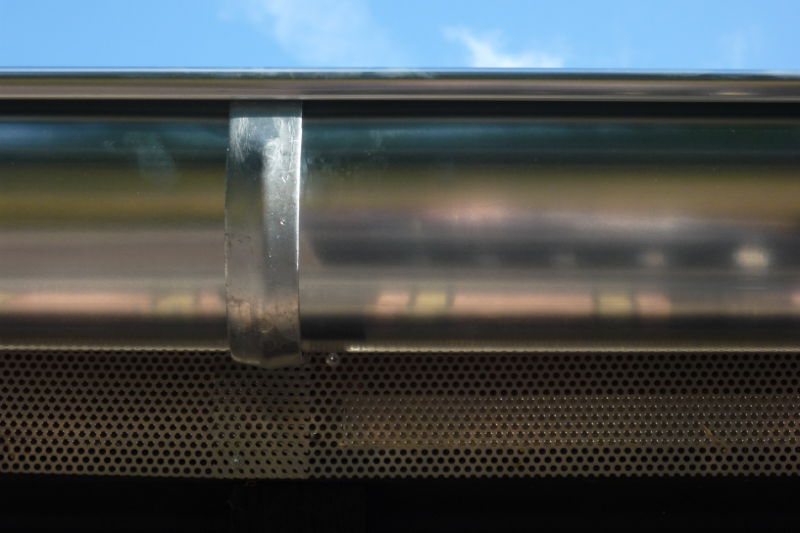 Zur Belüftung der Unterspannbahn an der Dachunterseite dient ein Traufenlüftungsgitter